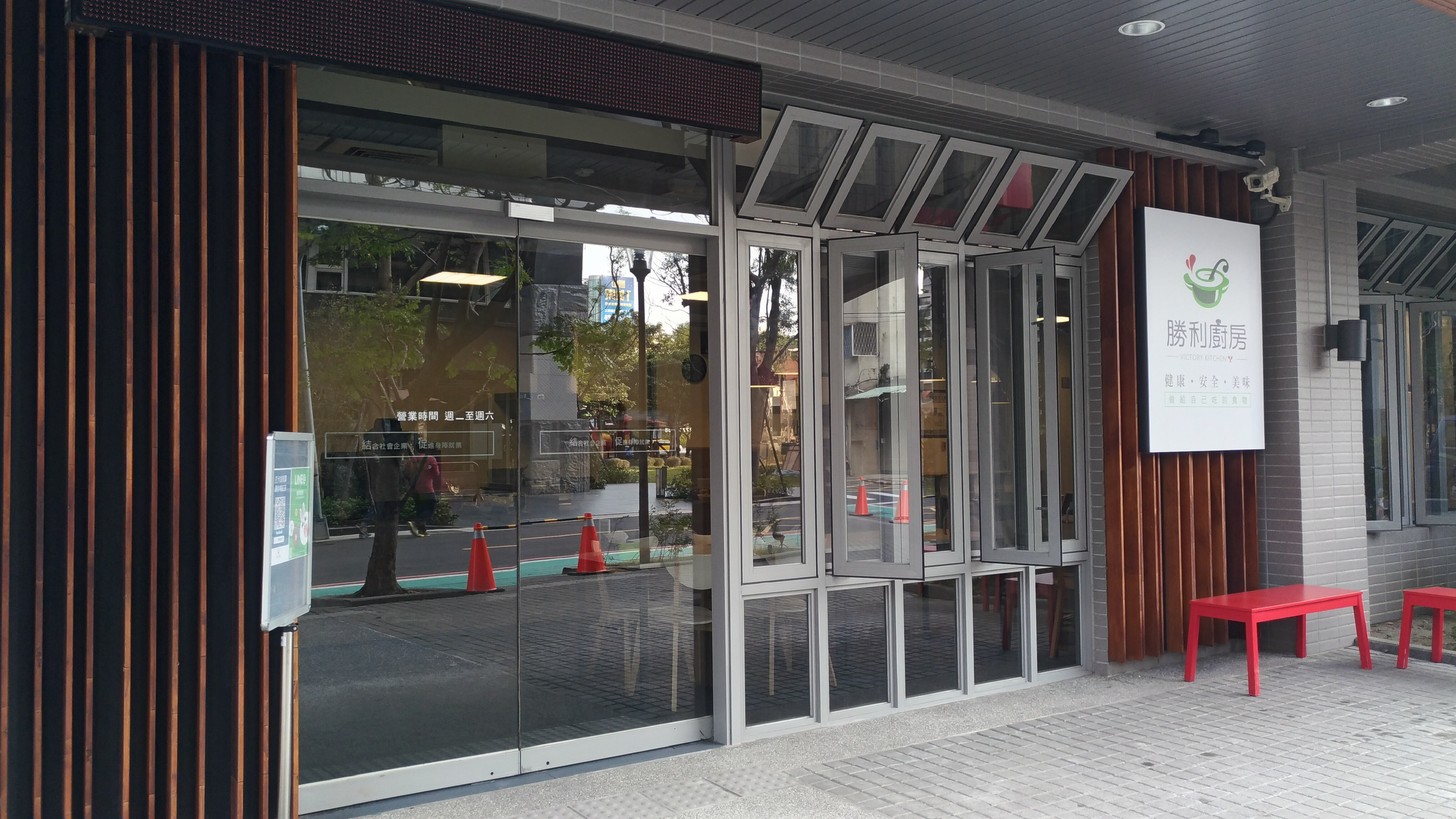 位於社企大樓一樓的勝利廚房餐廳